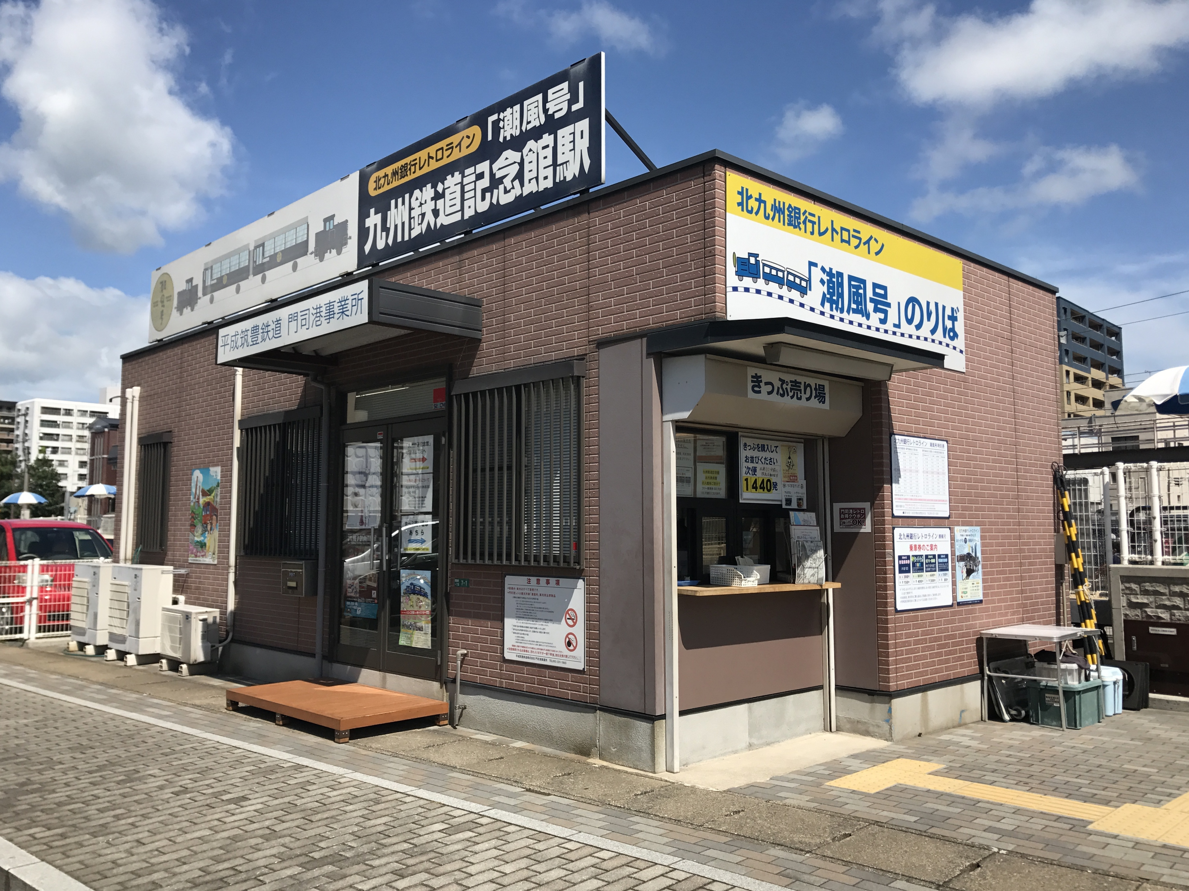 九州鉄道記念館駅駅舎